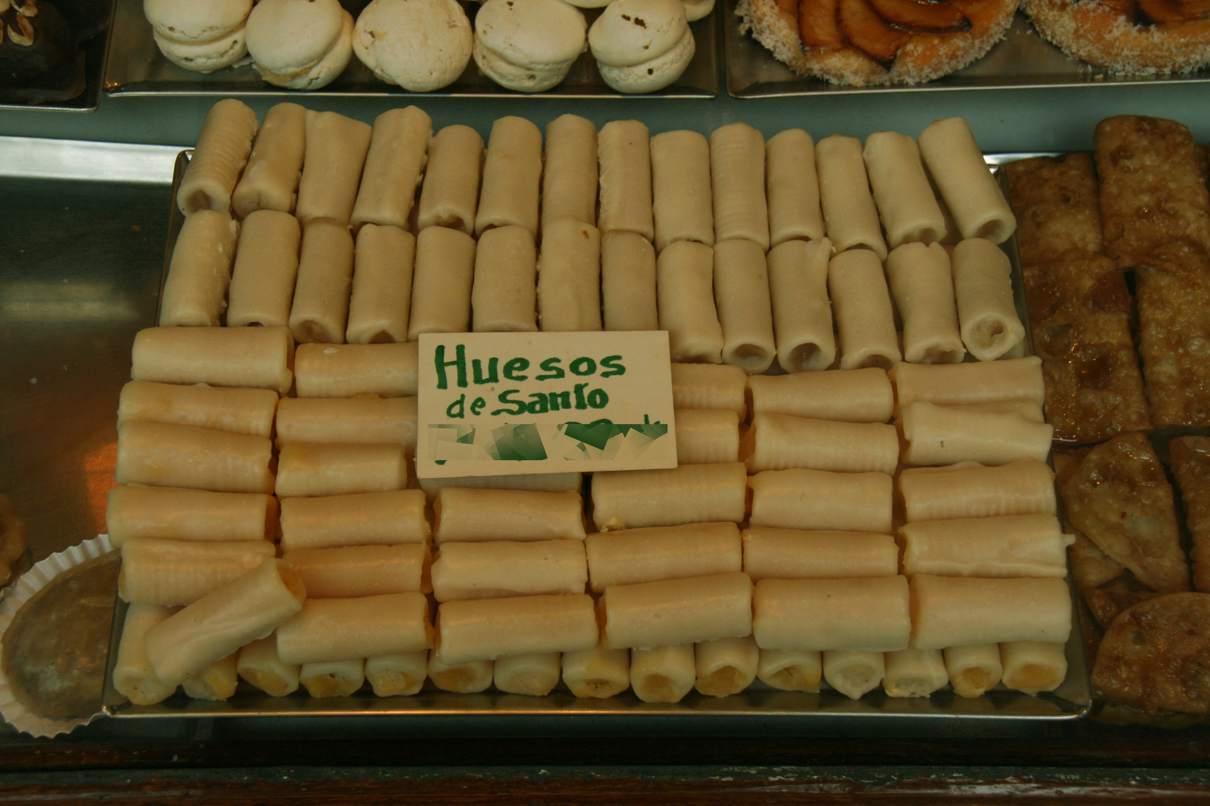 Huesos de Santo (Heilige Knochen) sind Desserts aus Marzipan, weiß, länglich und zylindrisch (ähnlich einem Markknochen), die ursprünglich mit süßen Ei gefüllt wurden.